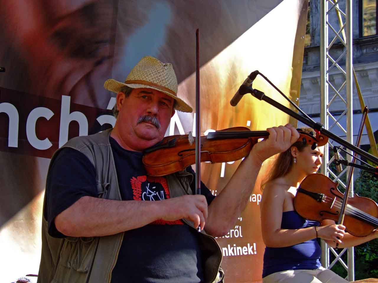 Halmos Béla a II. Táncház Napon